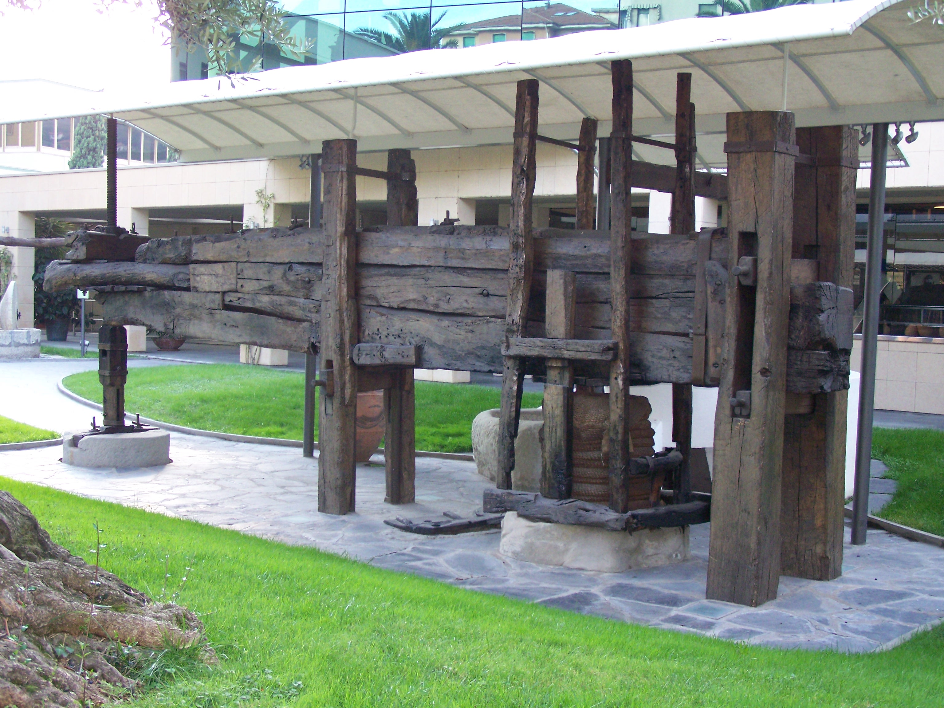 Pressoir "à bascule" italien du XVII° siècle, reconstitué dans les jardins du Museo Dell'Olivo (Imperia, Italie)